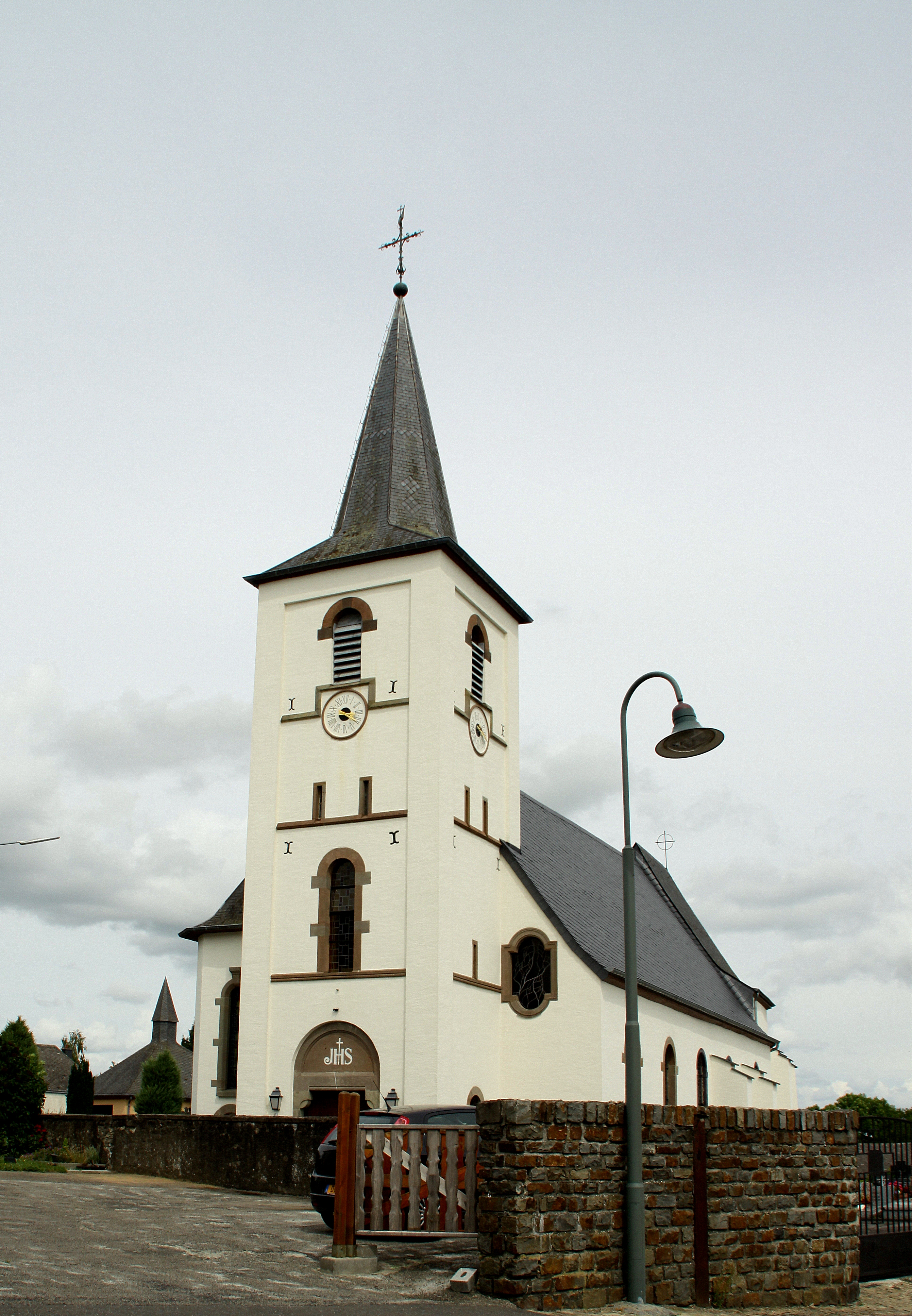 D'Kierch vu Aasselbuer